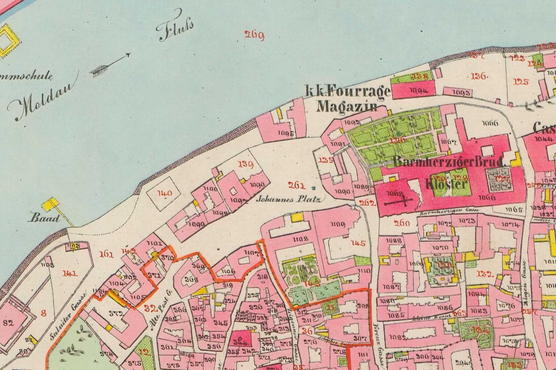 Praha, Staré Město, bývalé Janské náměstí s kostelem svatého Šimona a Judy, klášterem Milosrdných bratří a bývalým kostelem svatého Kříže většího a zrušeným klášterem řádu Křižovníků s červeným srdcem. Císařské povinné otisky stabilního katastru 1:2 880, mapováno 1842, opravené vydání 1852. Výřez z mapového listu 6068-1-002